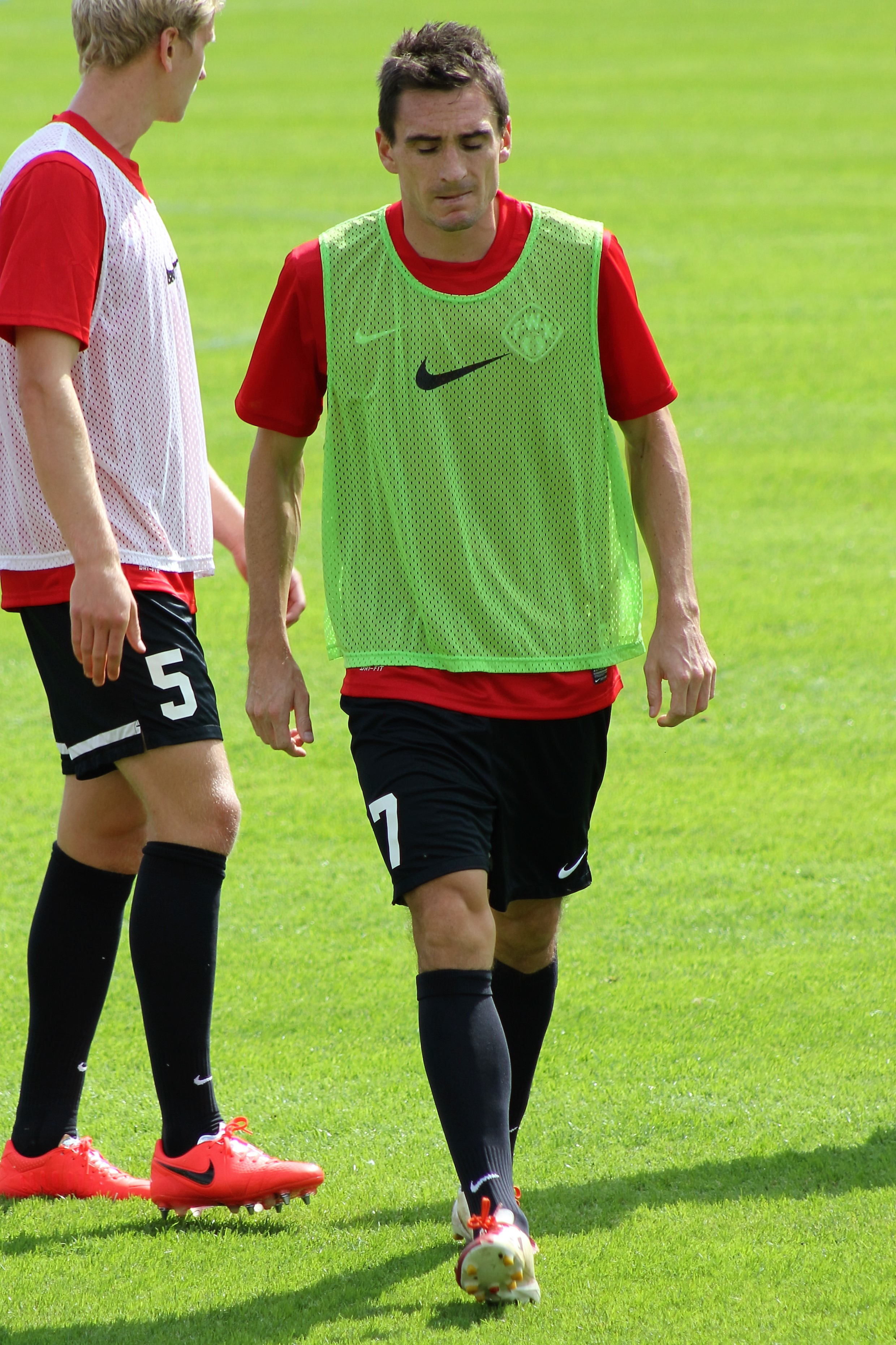 Haller, Marco Würzburg